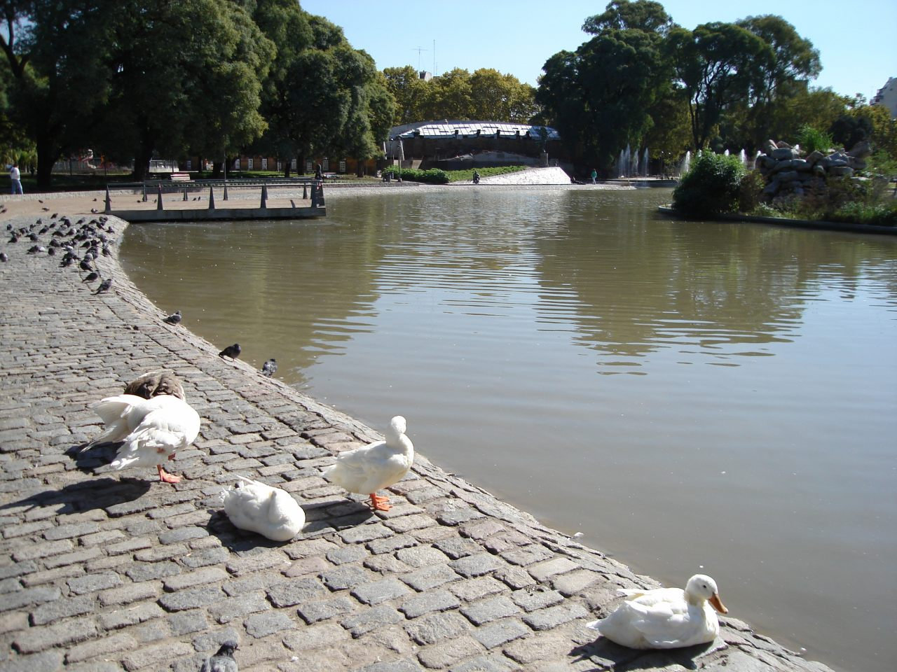 Vista del lago del Parque Centenario, Buenos Aires.